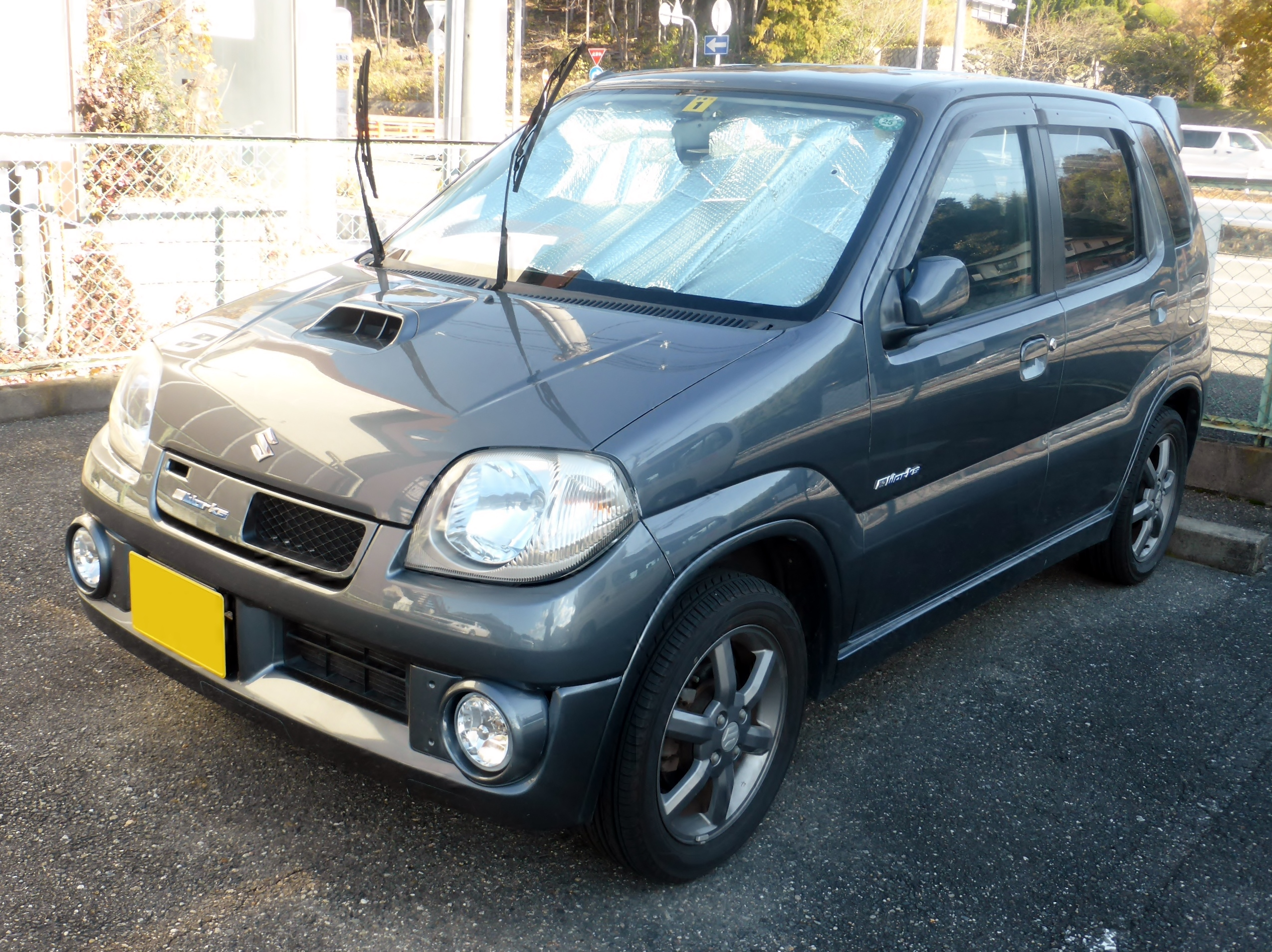 HN22S型スズキ・Keiワークスをフロントから撮影。